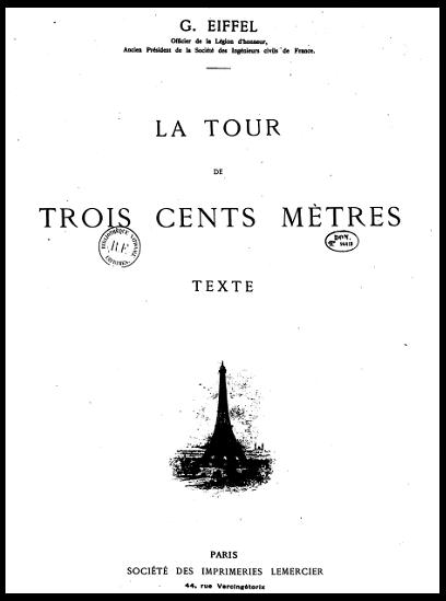 Couverture de l'ouvrage La tour de 300 mètres de Gustave Eiffel. Livre de 1900 dans le domaine public.